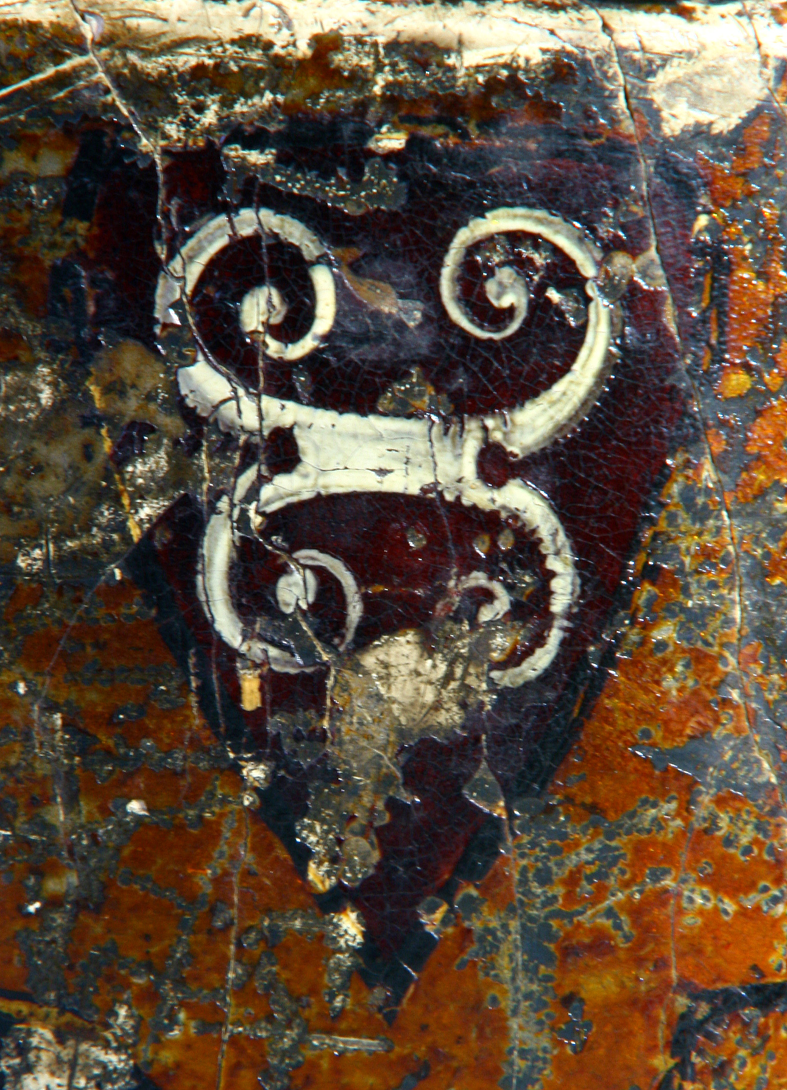 Heraldisches Denkmal der Mittelaters